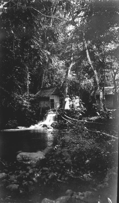 Foto. Het plaatsje Darma ten westen van Koeningan gelegen op de flanken van de vulkaan Goenoeng Tjareme, West-Java